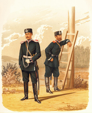 Инженерные войска. Обер-Офицер Гренадерского Саперного Е.И.В. Кн. Петра Николаевича батальона ( в парадной строевой форме ) и Унтер-Офицер 1-го Военно-Телеграфного парка ( в парадной и обыкновенной форме, вне строя ) ( прик. по воен. вед. 1881 г. № 313 )